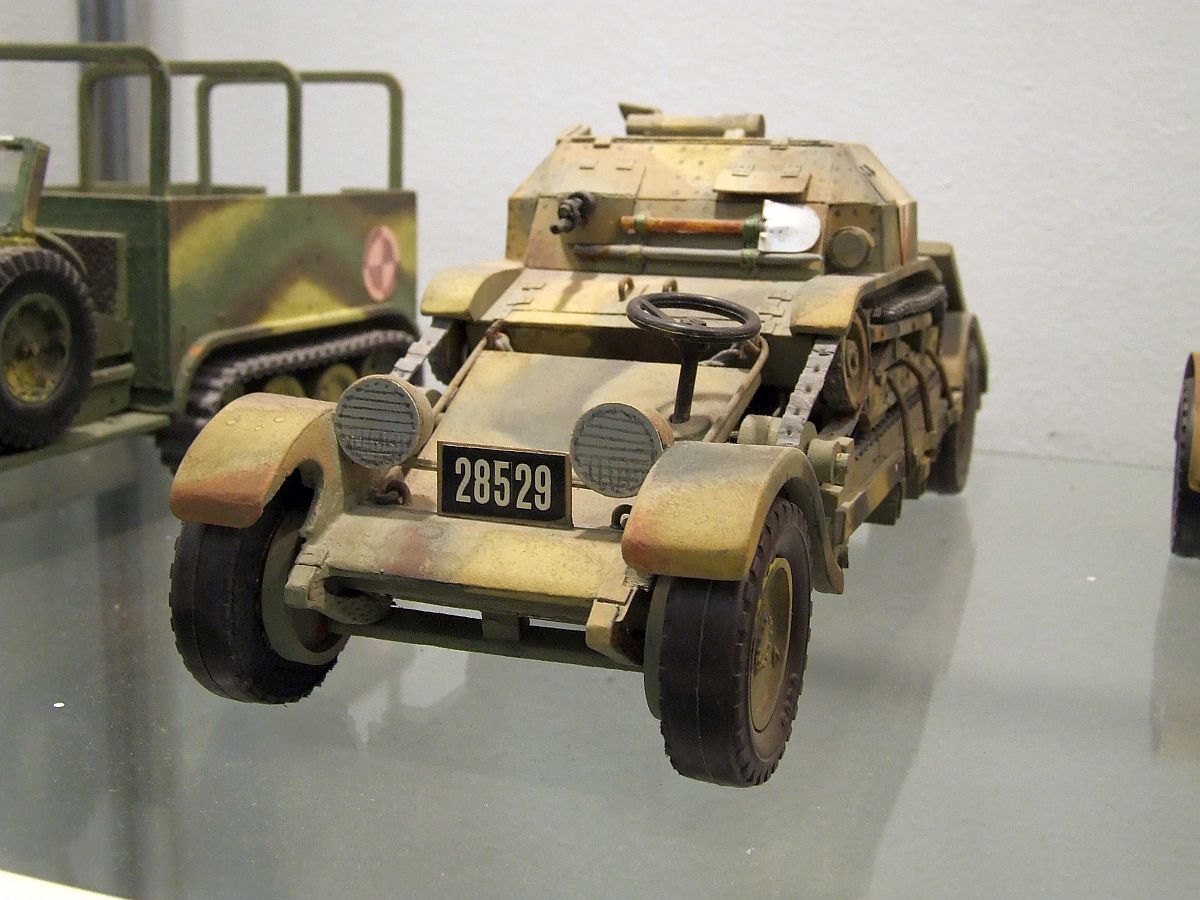 TK-3 na autotransporterze (model), Muzeum Techniki, Warszawa